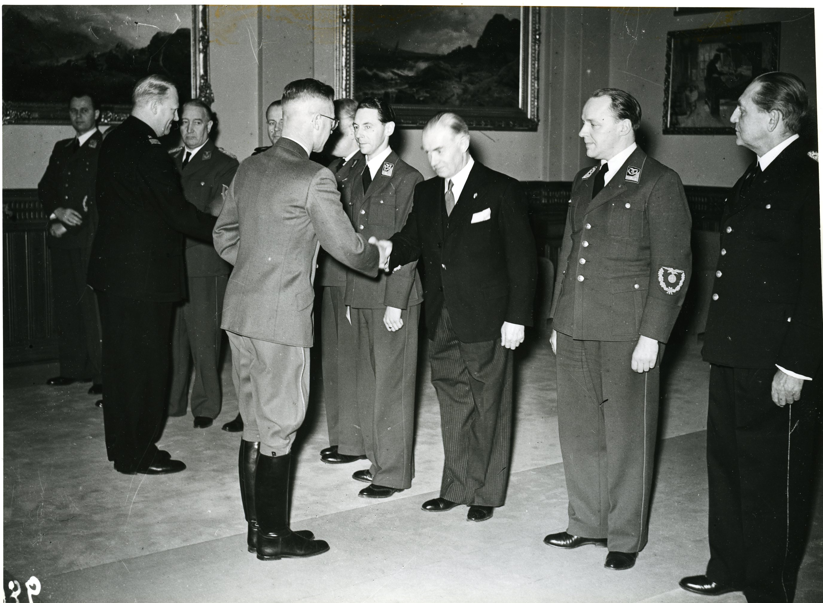 De kommissariske statsråder innleverte sine avskjedssøknader og ble deretter utnevnt til statsråder. 1942/02/01. RA/PA-1209/Ue 94/ img053 «Statsakten» var en seremoni på Akershus slott i Oslo under andre verdenskrig 1. februar 1942 da rikskommissar Josef Terboven innsatte Vidkun Quisling, leder for Nasjonal Samling (NS), som «ministerpresident» i Norge, og de tyskkontrollerte kommissariske ministerne ble erstattet av «den nasjonale regjering» utgått fra NS. «Statsakten» markerte at Quisling fikk den formelle makta i Norge, og ved lov av 12. mars 1942 ble NS «statsbærende parti». Quisling hadde håp om at ordninga også skulle gi NS reell makt og føre til fred mellom Norge og Tyskland, men tysk tilsynsforvaltning gjennom Reichskommissariat Norwegen fortsatte som før inntil frigjøringa 8. mai 1945.